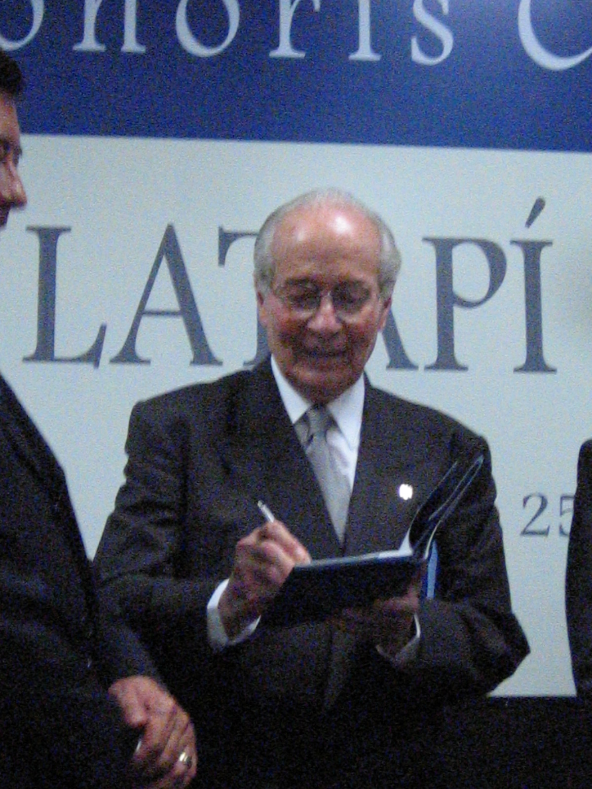 Pablo Latapi Sarre como Doctor Honoris Causa de la Universidad de Colima, México.